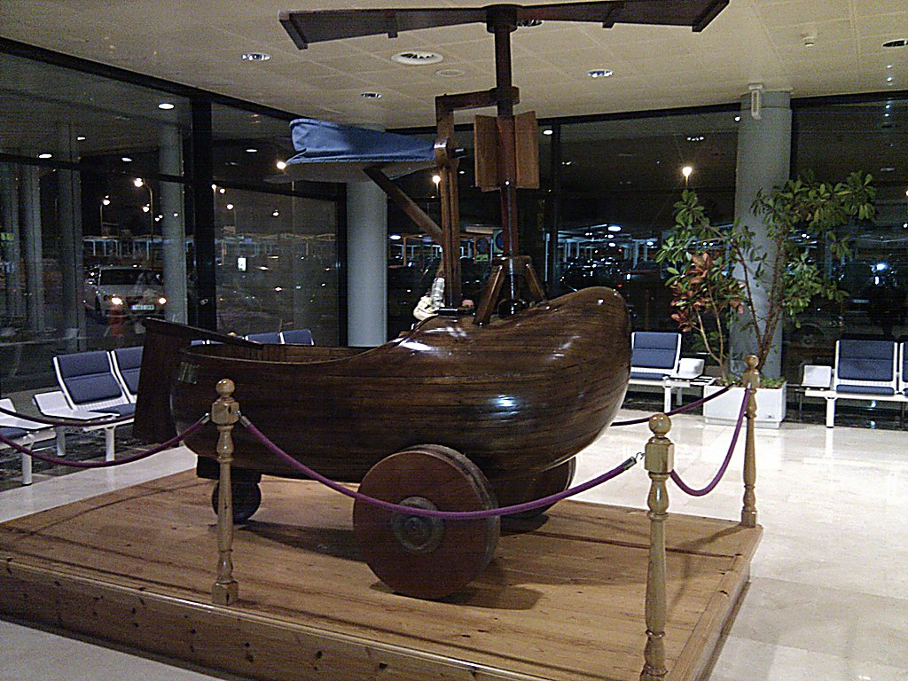 Estatua nel Aeropuertu d'Asturies